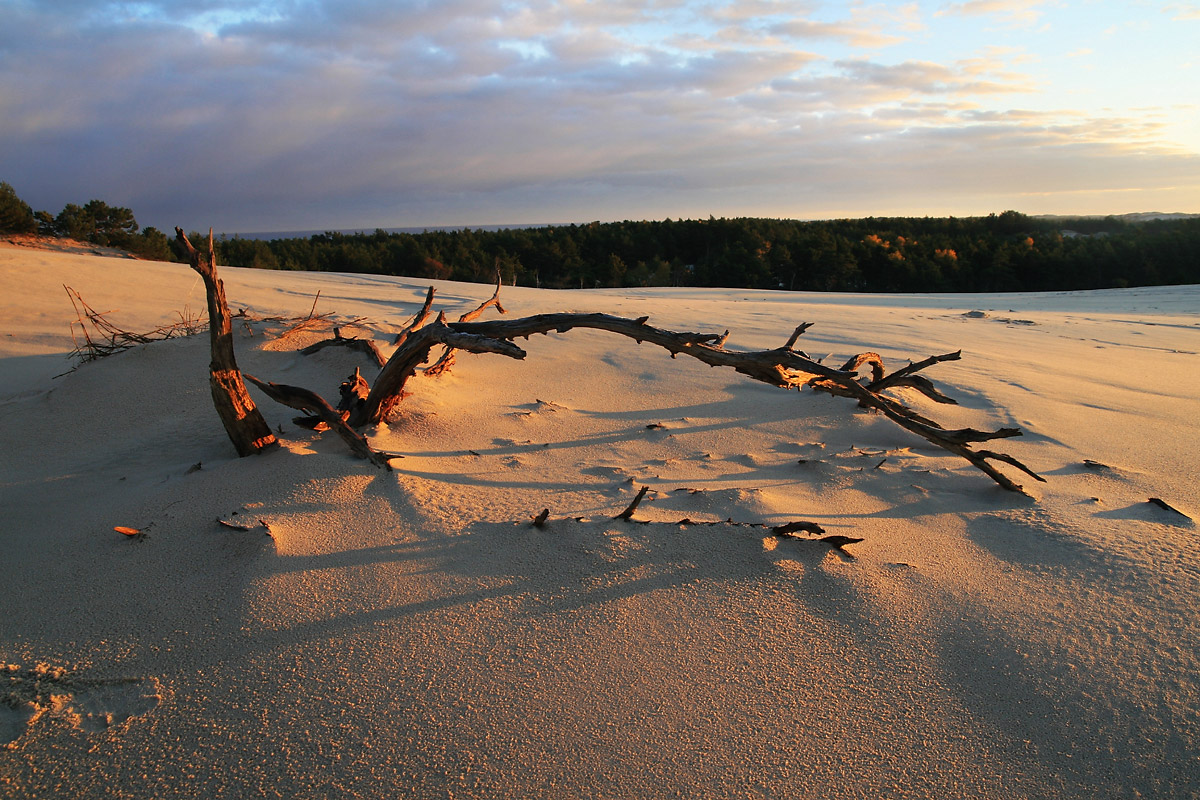 wydmy